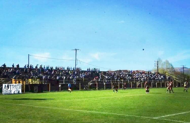 Γήπεδο Μεσοποταμίας